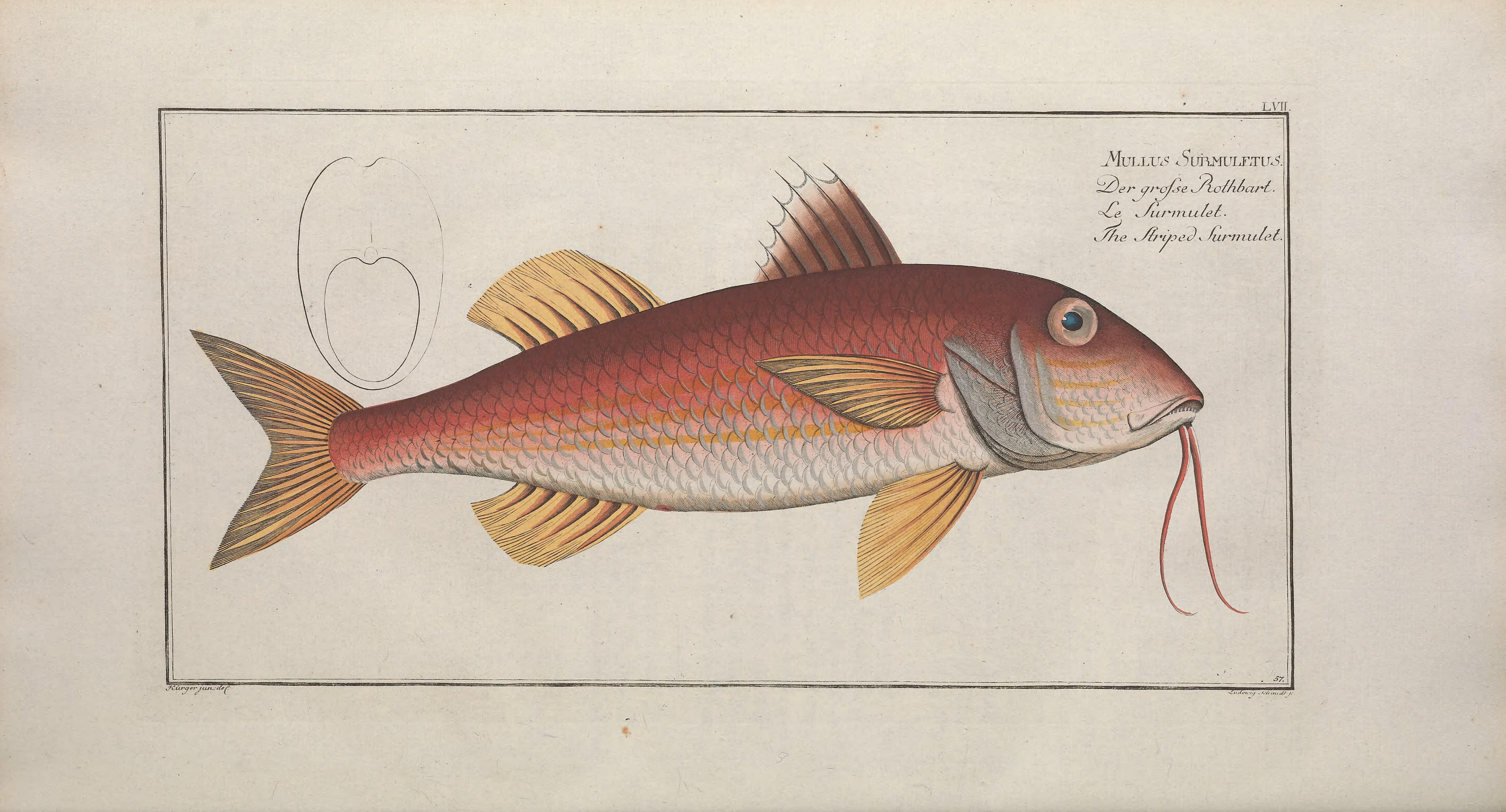 Ichtyologie, ou, Histoire naturelle, générale et particulière des poissons : avec des figures enluminées, dessinées d'après nature /